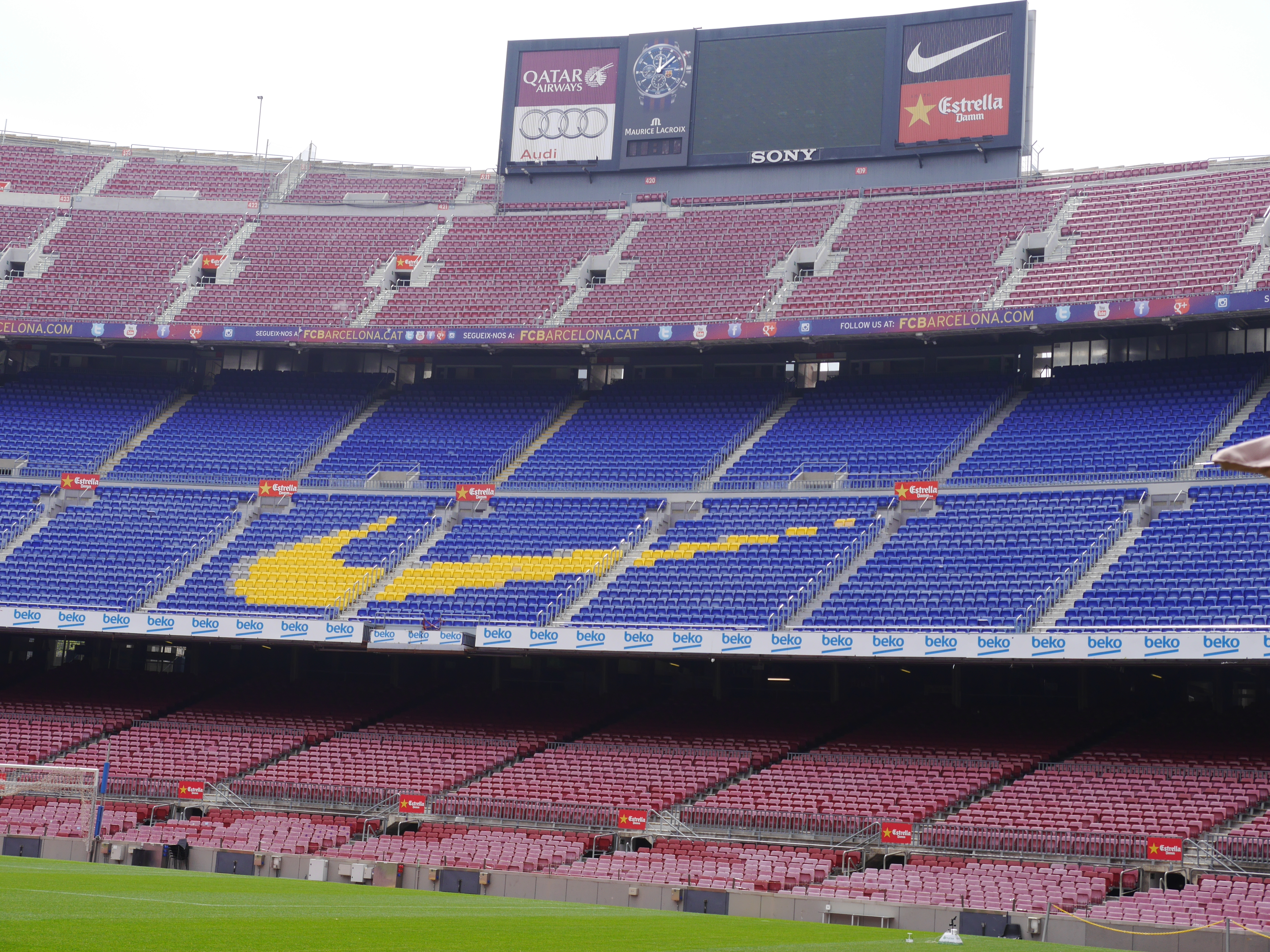 This photo was taken with Panasonic Lumix DMC-G6 camera, thanks to Panasonic. You can see all photographs in category: Taken with Panasonic Lumix DMC-G6.